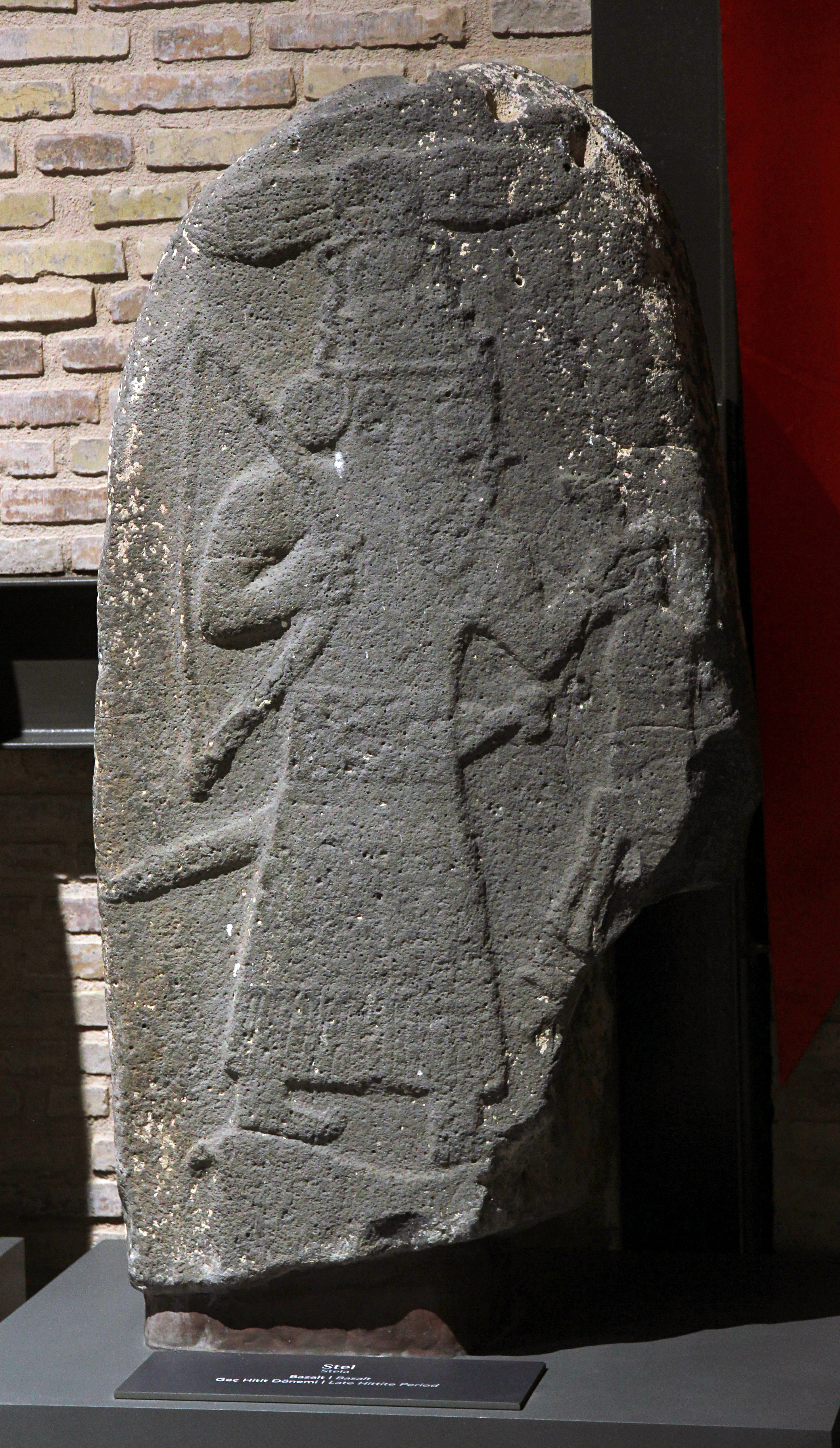 Archäologisches Museum Adana, Südtürkei, späthethitische Stele eines Schutzgottes aus Hacıbebekli